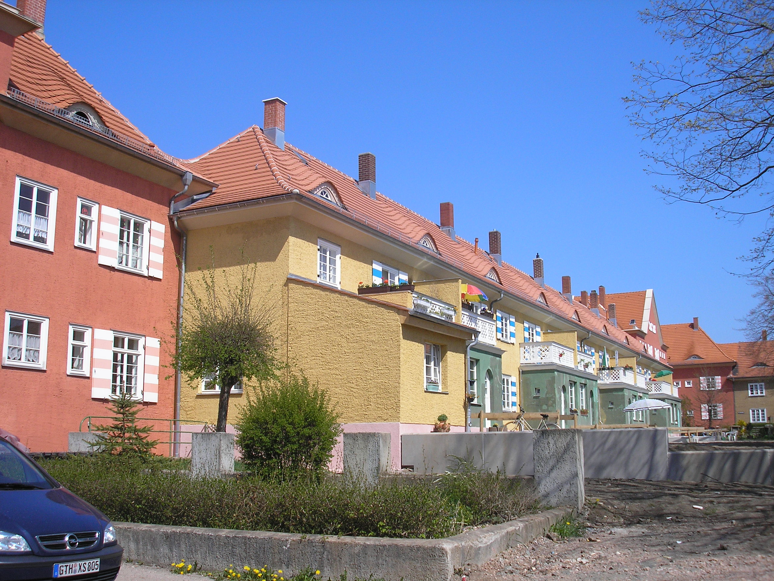 Die Gartenstadt "Am Schmalen Rain" in Gotha (Thüringen).